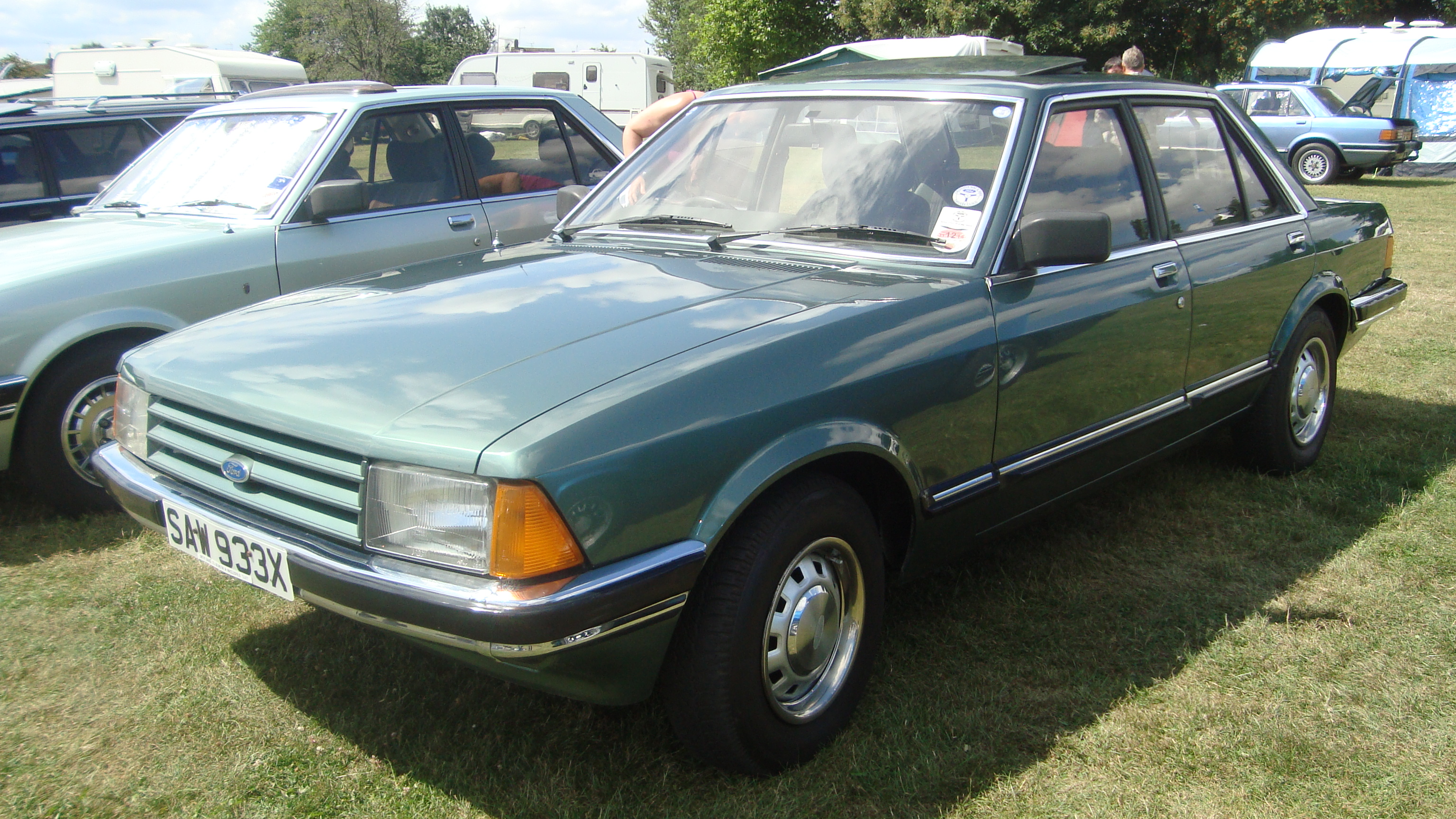 1982 Ford Granada 2.8 GL